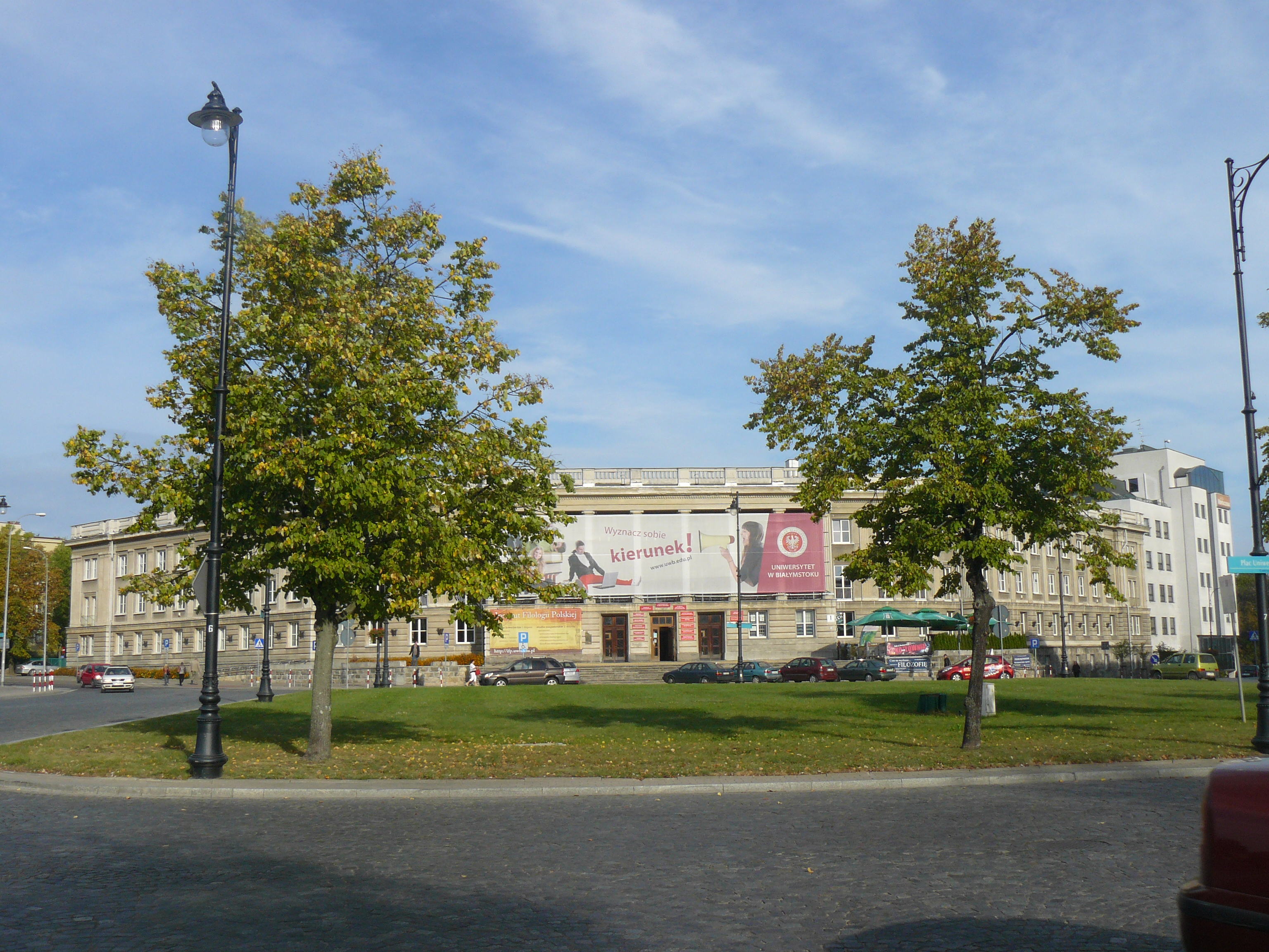 Białystok, Plac Uniwersytecki - dawny Dom Partii, obecnie wydział historii i nauk politycznych UwB (zabytek nr A-229 z 9.09.1993)